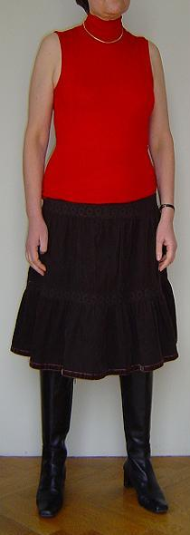 Photo sous-pull rouge sans manche + jupe + bottes cavalières